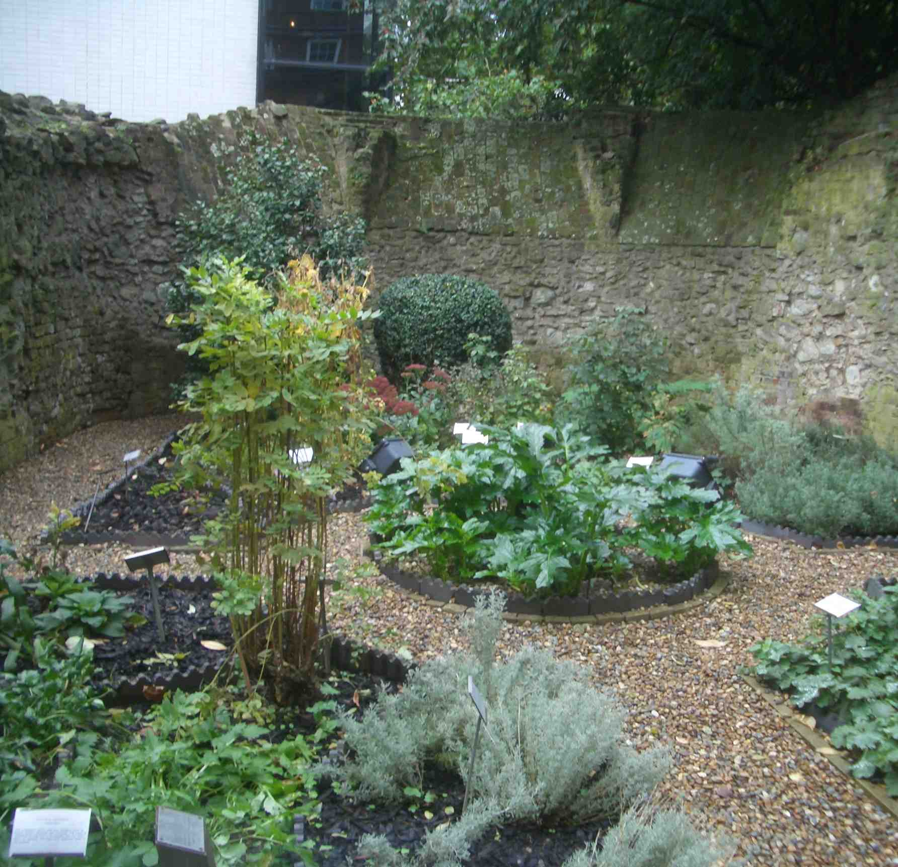 City of London, Barber's Hall Garden